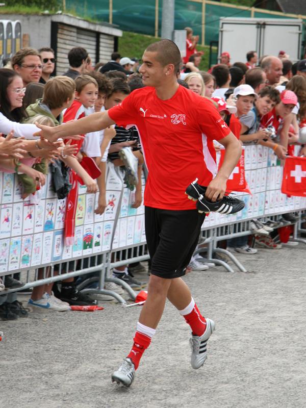 Eren Derdiyok im Trainingslager der Schweizer Fussballnationalmannschaft vor der Euro 2008